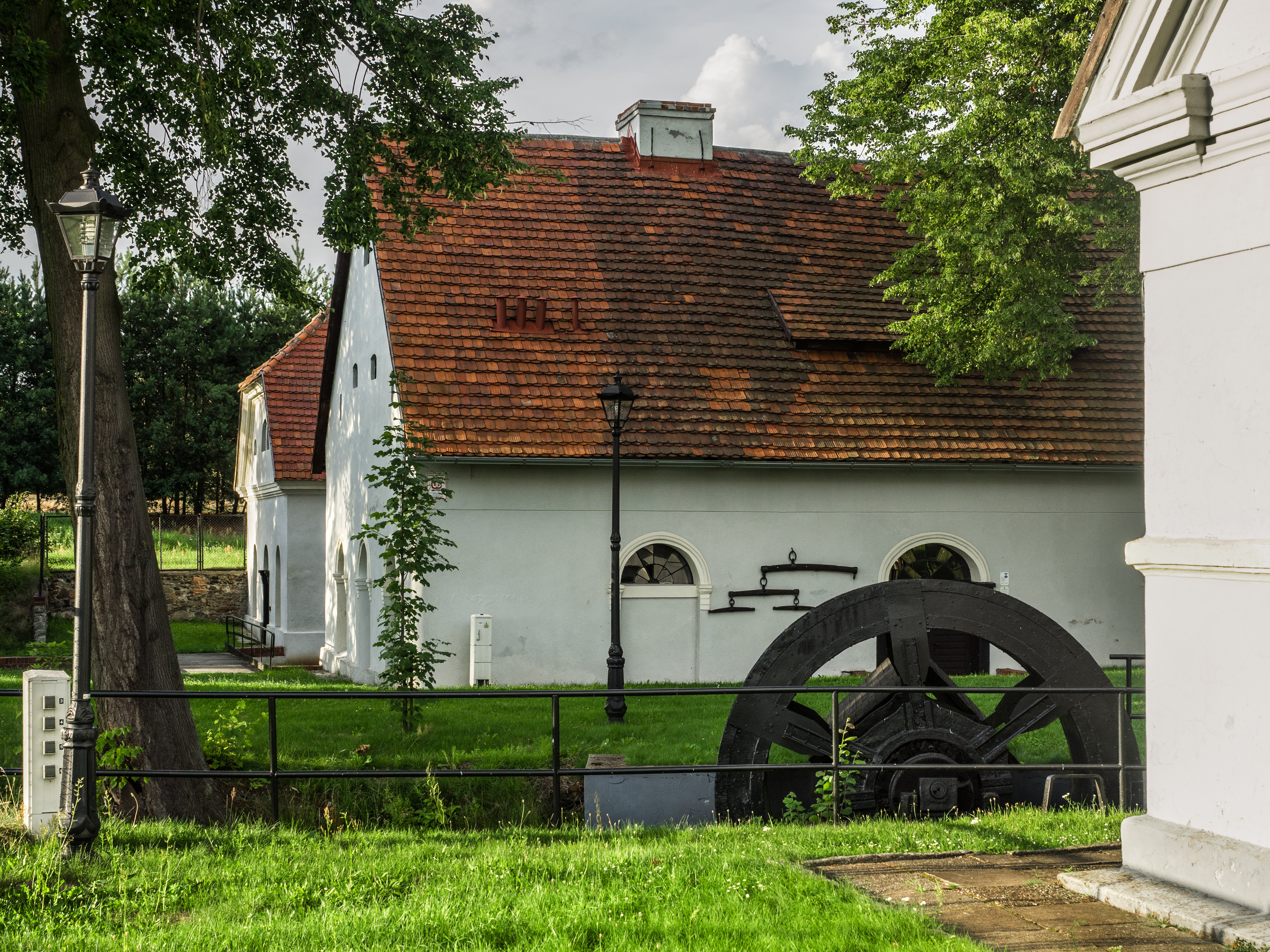 Zagwiździe, zespół huty żelaza, XVIII, XIX, XX